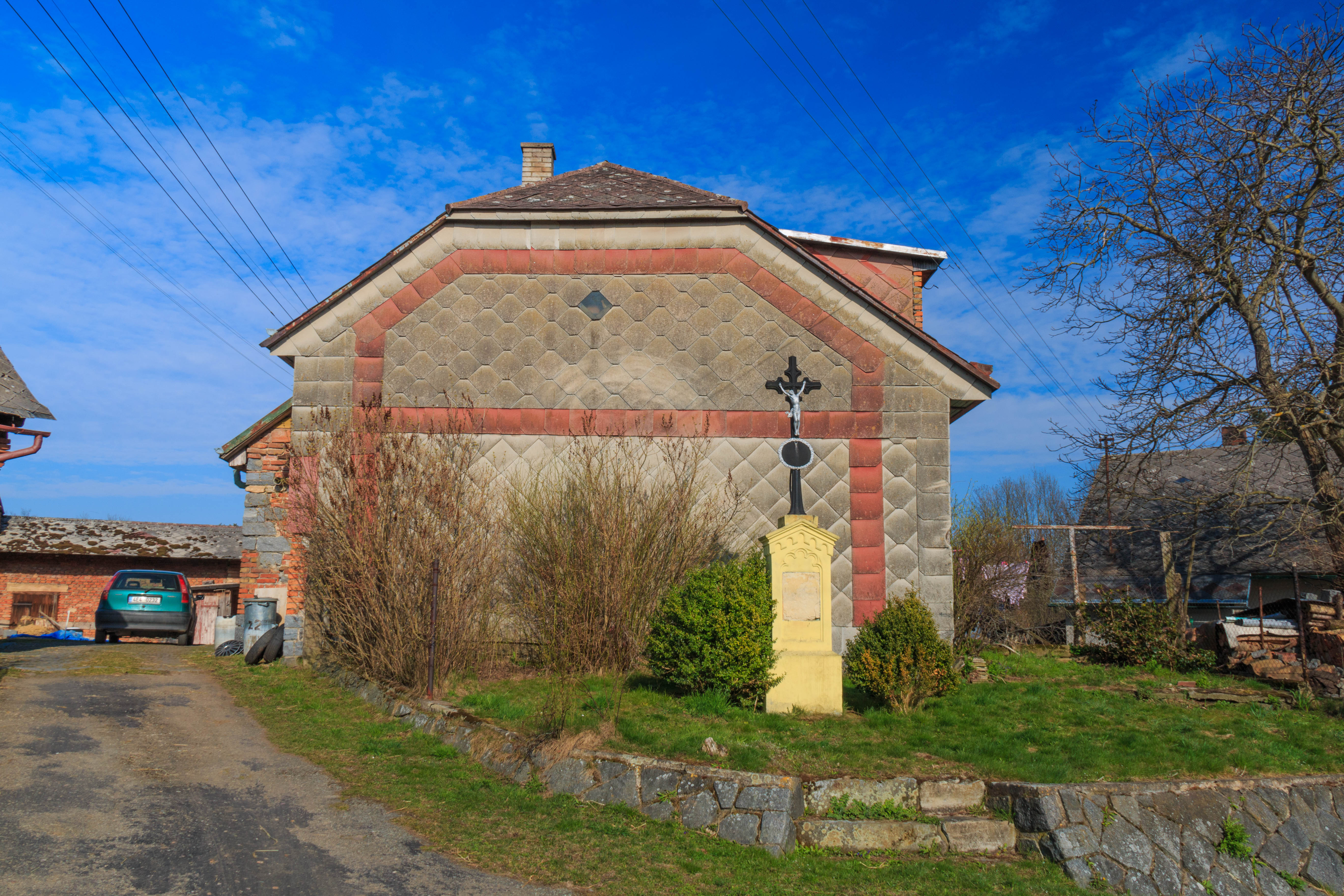 Čekov kříž